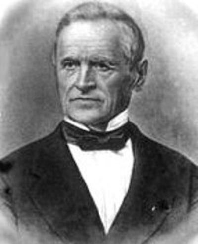 Moritz Seebeck, Gymnasialprofessor in Meiningen und Kurator der Universität Jena